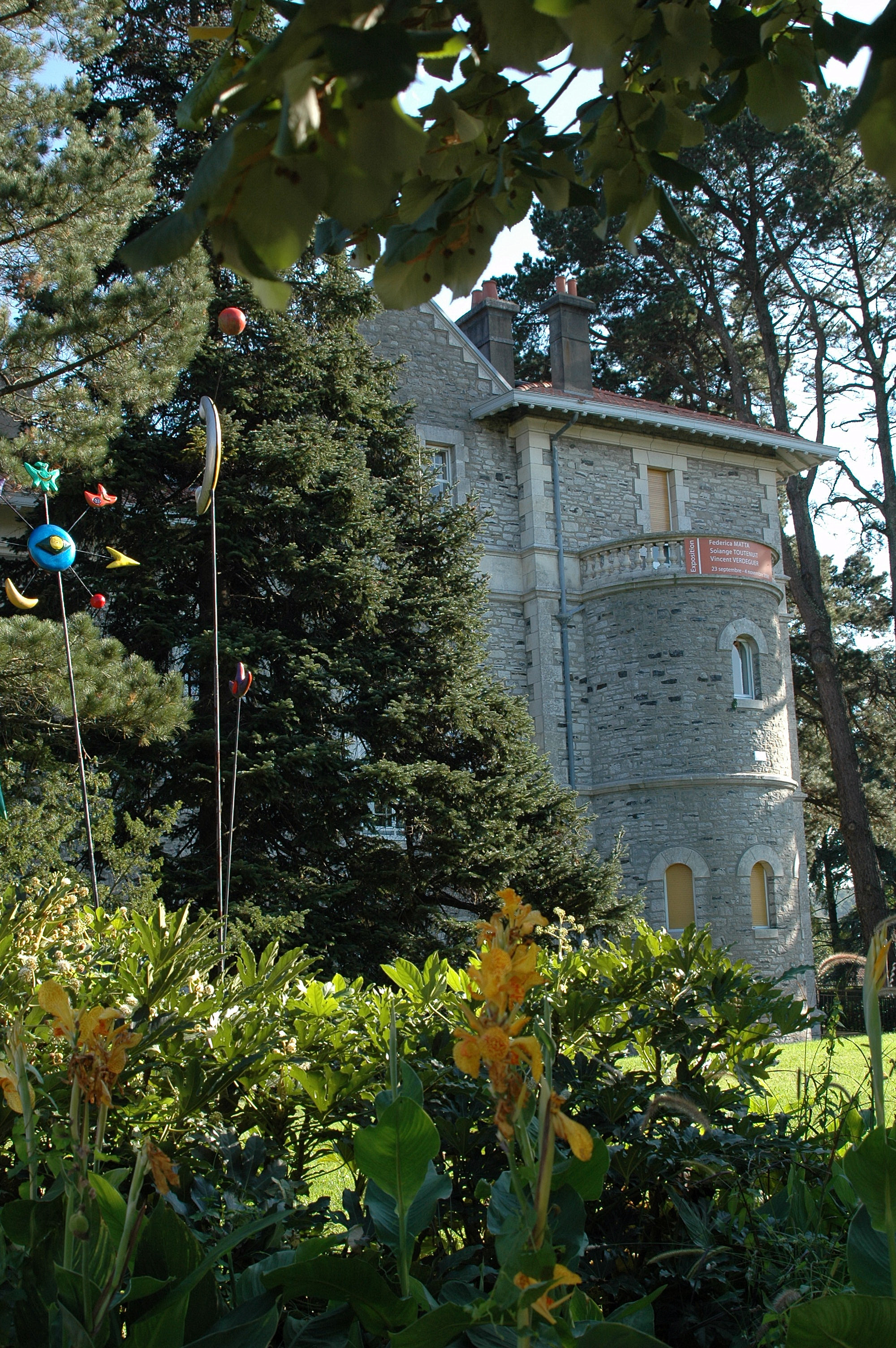 Anglet, villa Béatrix Enea, dans le jardin public. Photo prise le 16/08/06 par Harrieta171